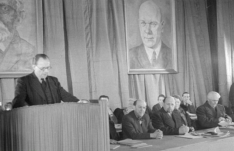 Original image description from the Deutsche FotothekPorträts: H. Köhnen Bernard Koenen, Olga Körner, Eva Höhn, Gertrud Graeser (Rast), Walter Fisch, Maria Rentmeister